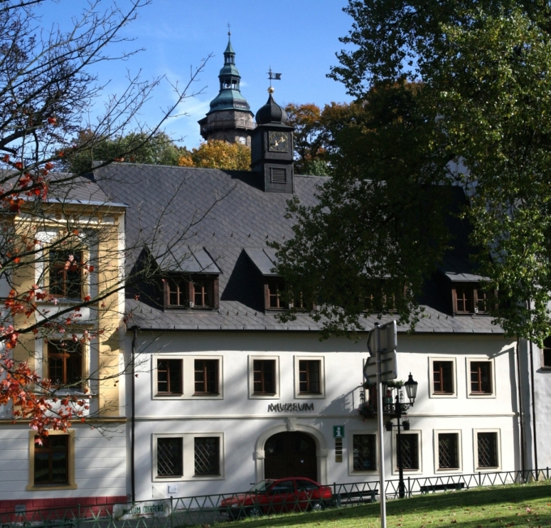 Muzeum Horní Slavkov